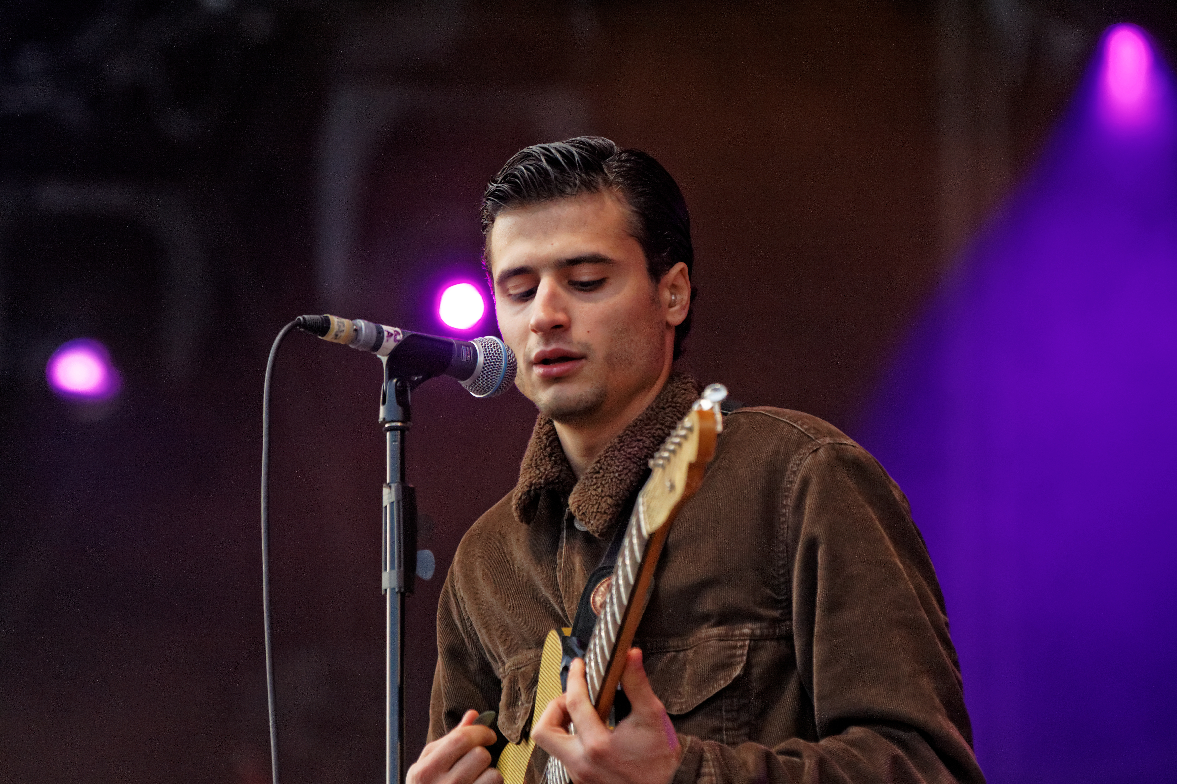 BB Brunes en concert sur la grande scène lors de la fête de l'Humanité 2012.